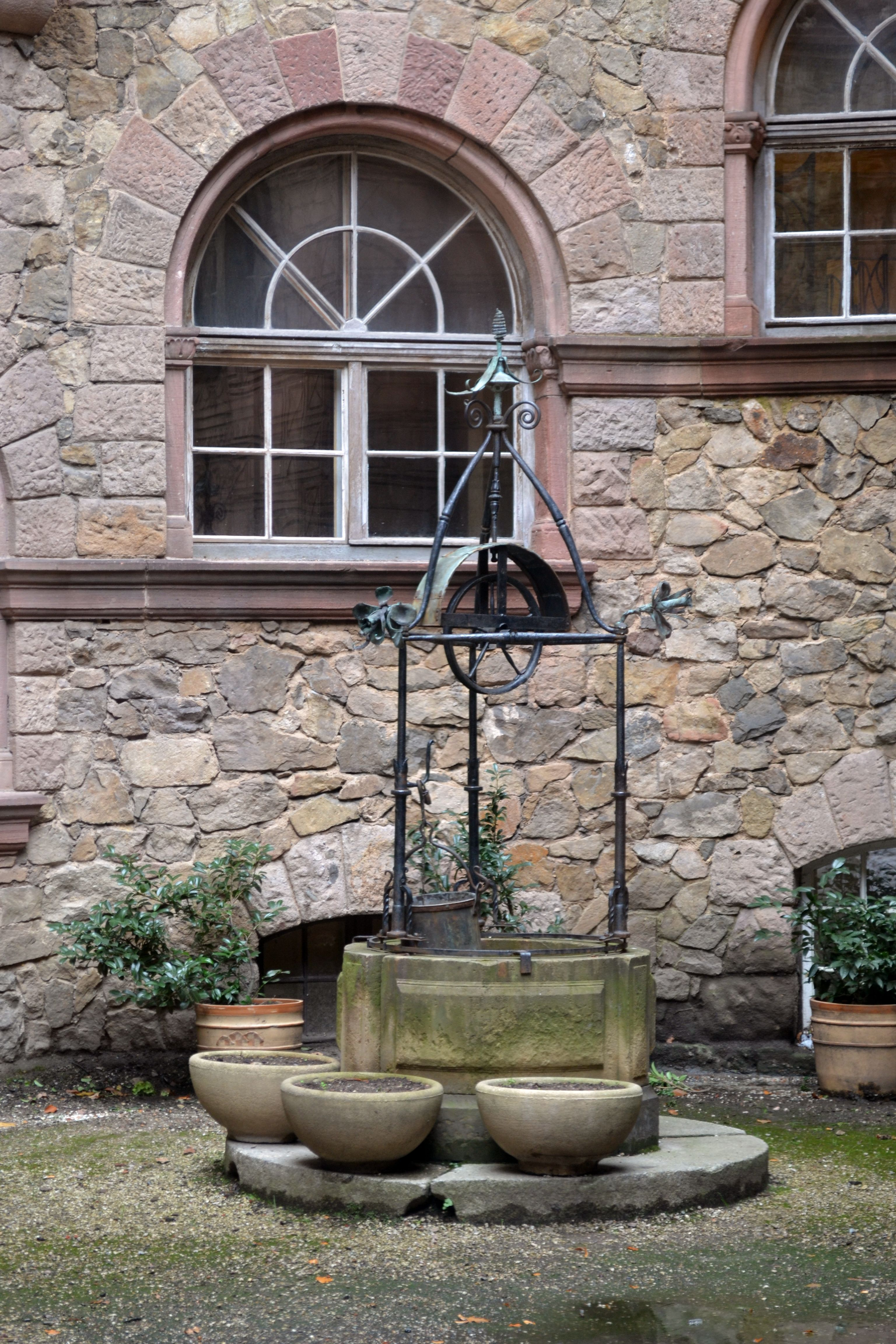 Der Ziehbrunnen im Schwarzen Hof, dem Kern der alten Burg Fürstenstein sicherte die Wasserversorgung der mittelalterlichen Feste und ist der älteste Fürstensteiner Brunnen[1]. Schloss Fürstenstein (Zamek Książ), Waldenburger Bergland, Niederschlesien, Polen.